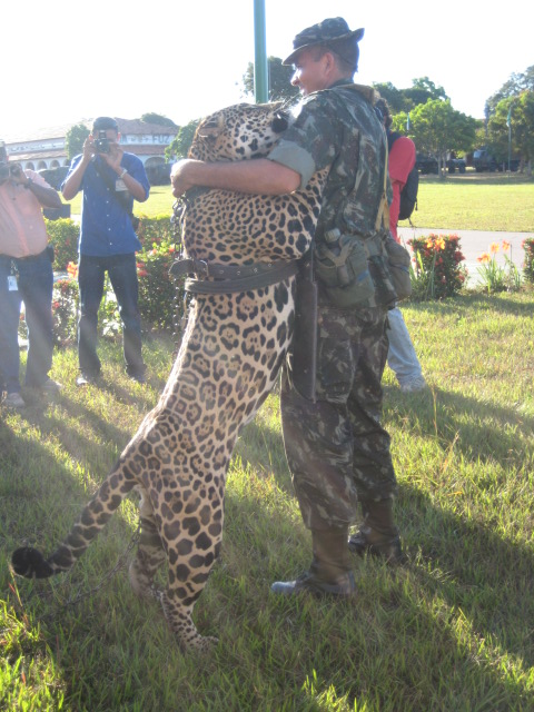 Esse é o mascote da 23ª Brigada. Nesse dia, ele não queria tirar fotos.